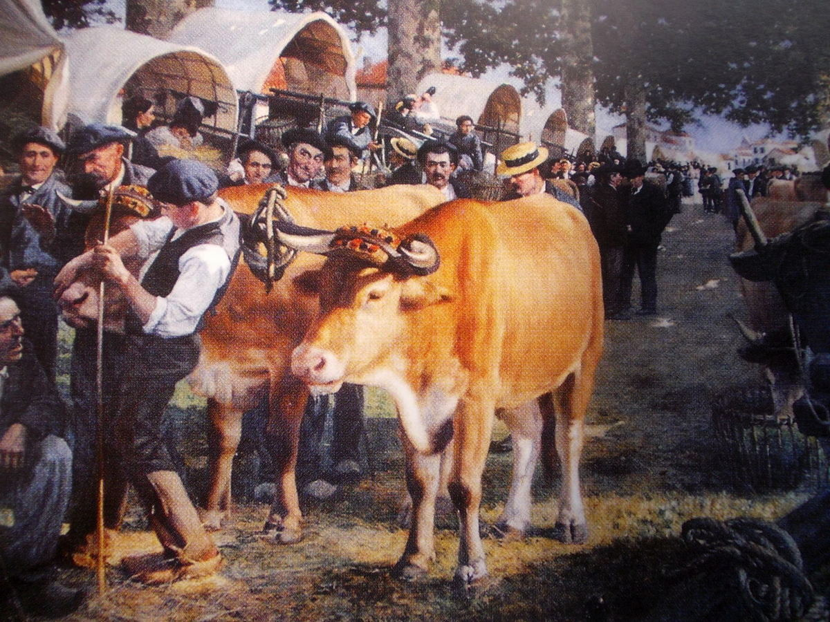 Foire en Gascogne, Saint-Justin, 1907.